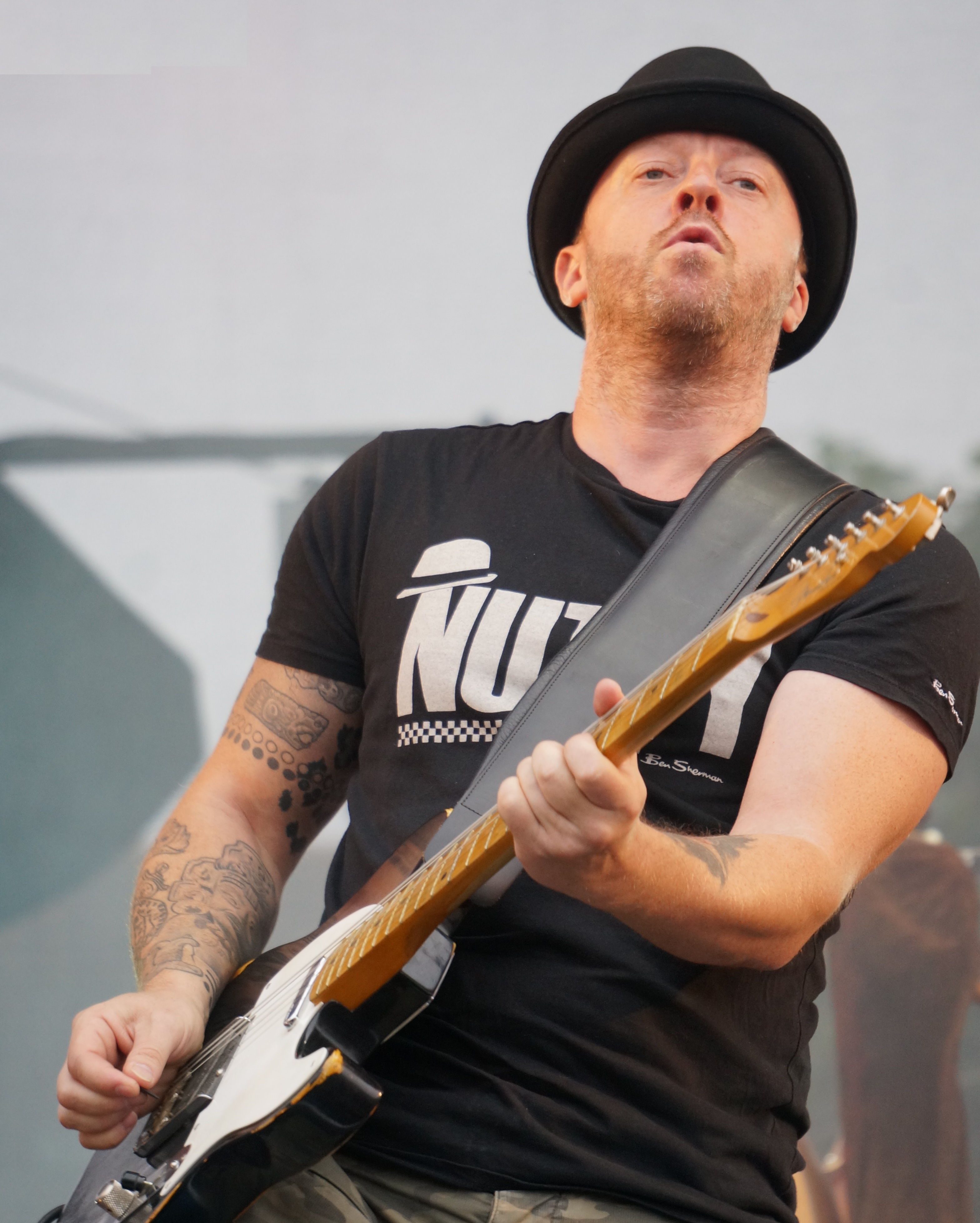 Pigalle (groupe) lors de Un été dans l'Aisne 2015 à Laon.